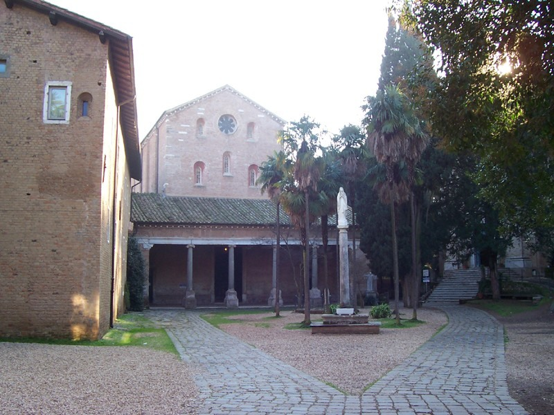 Roma - Chiesa abbaziale dei Ss. Vincenzo e Anastasio alle Tre Fontane